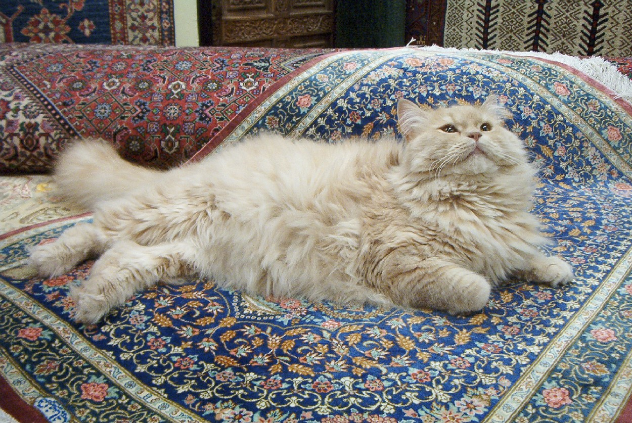 Chat persan beige-crème